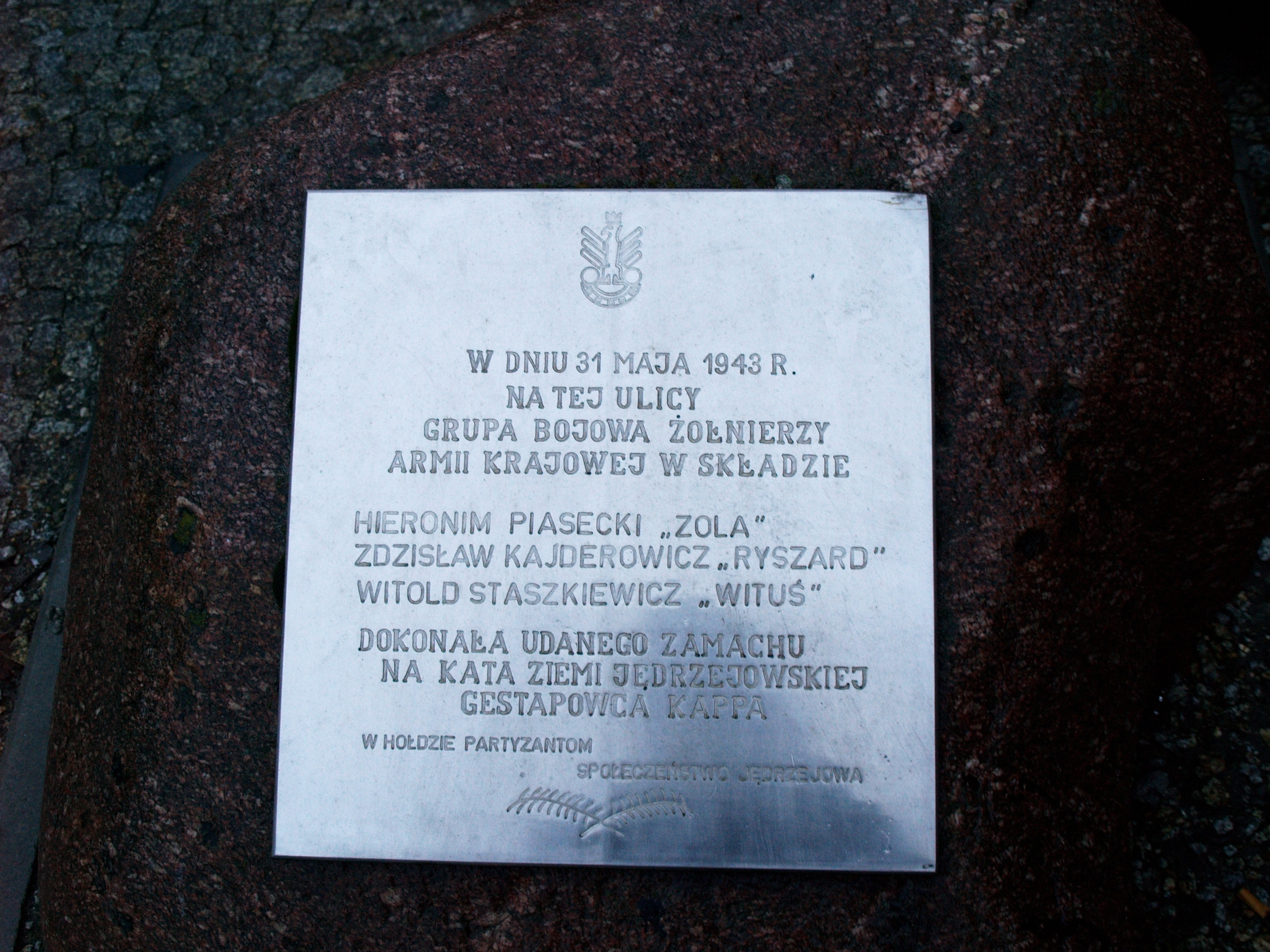 Tekst na pomniku upamiętniającym zamach na gestapowca Kappa w Jędrzejowie.